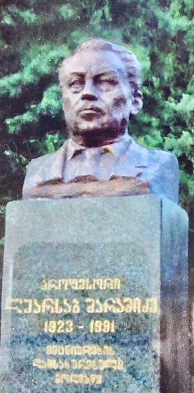 მედ. მეცნ. დოქტორი, პროფესორი ლუარსაბ შარაშიძის ბიუსტი